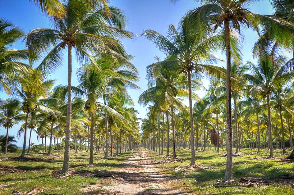 O coqueiral domina a paisagem dessa praia quase deserta, de areia branca e fina. Ali existem apenas uma pequena vila de pescadores. Local onde é realizado o Universo Paralello Festival